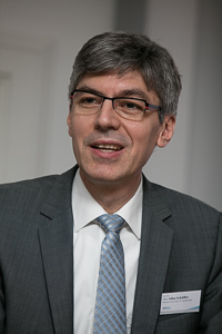 Prof. Dr. Alin Albu-Schaeffer fotografiert von Matti Hillig auf einer Konferenz in Berlin am 24.11.2015. Prof. Dr. Alin Albu-Schäffer Deutsches Zentrum für Luft- und Raumfahrt, Direktor des Instituts für Robotik and Mechatronik